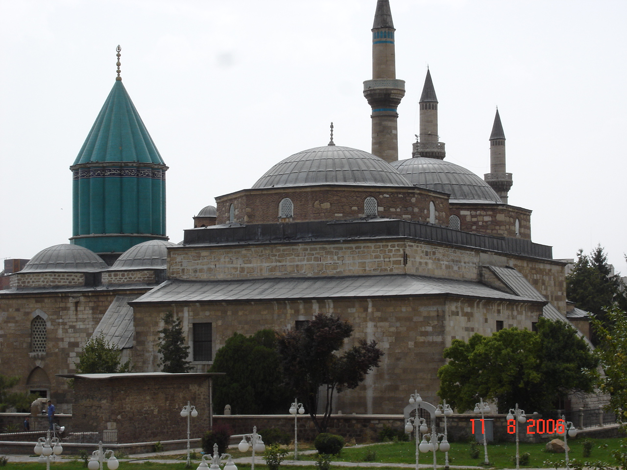 Mevlana tomb (Gül Bahçesi), Konya, Turkey